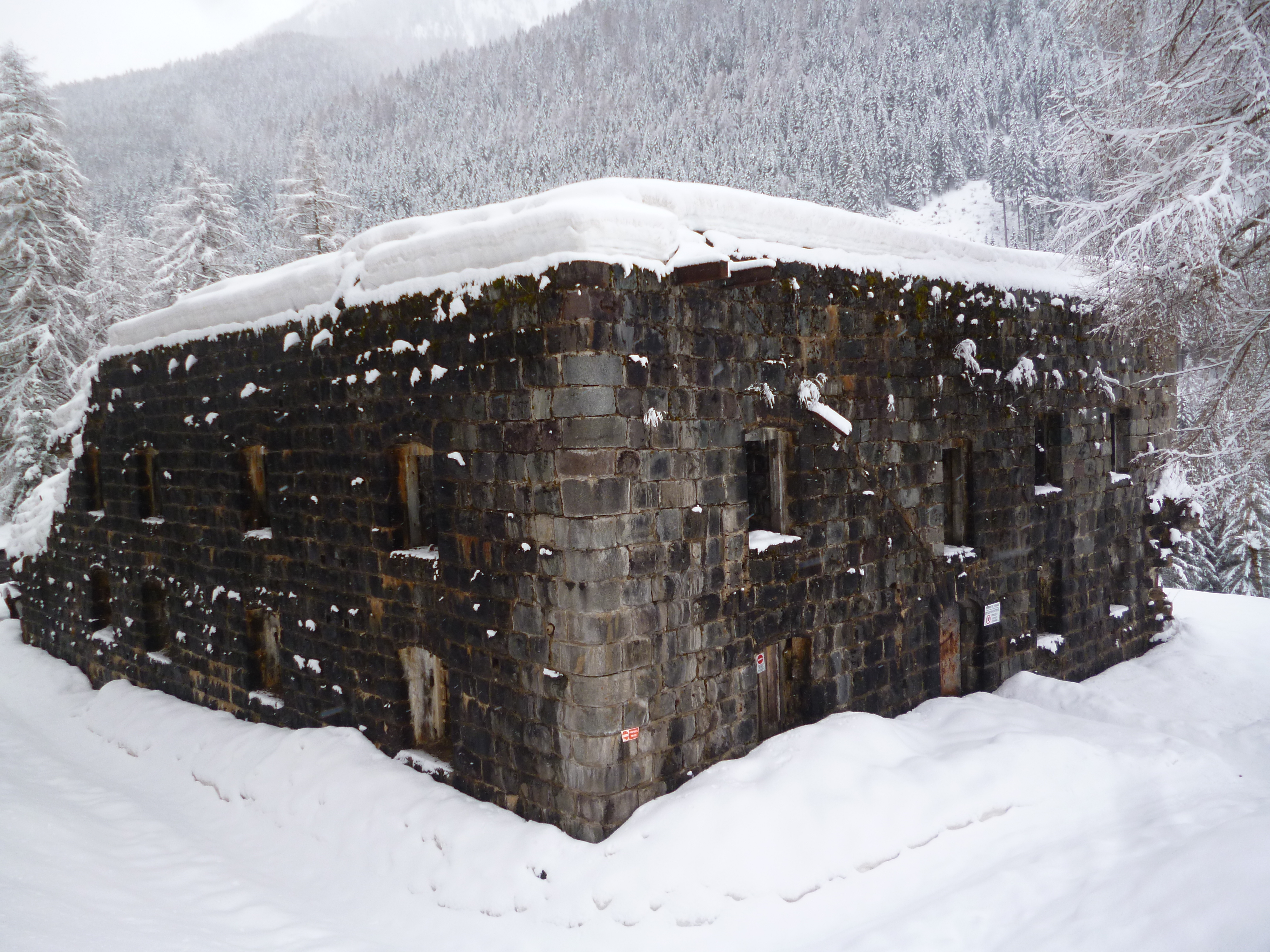 Forte someda moena trento italia 1